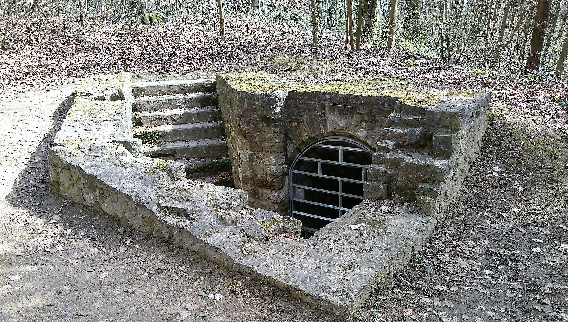 Luxembourg, accès casemates Fort Olizy.